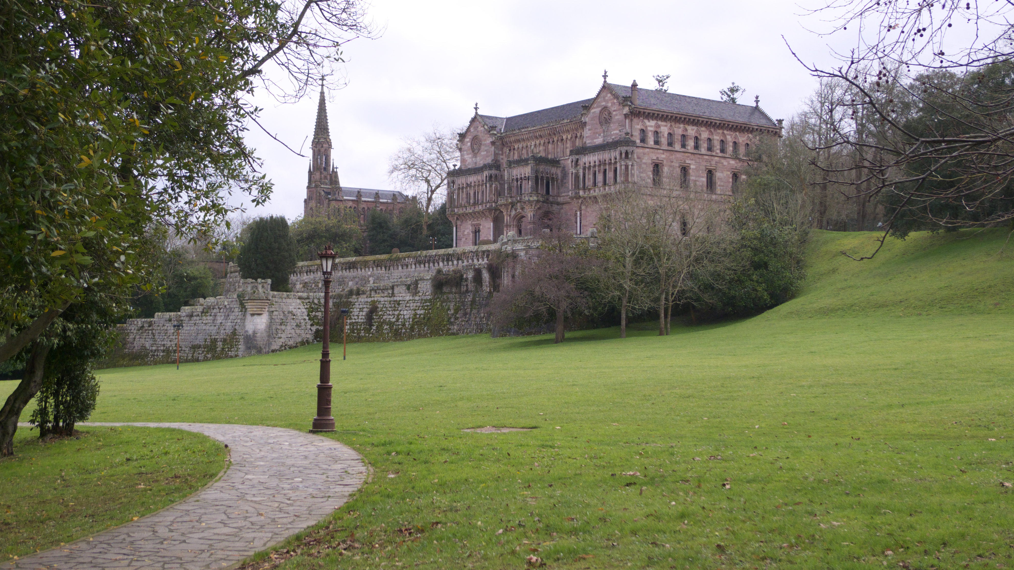 Vista de los edificios desde el Paseo de Solatorre